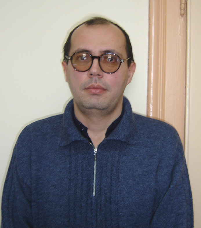 en: Bojan Đorđević, serbian literary historian sh: sh: Bojan Đorđević, srpski historičar književnosti